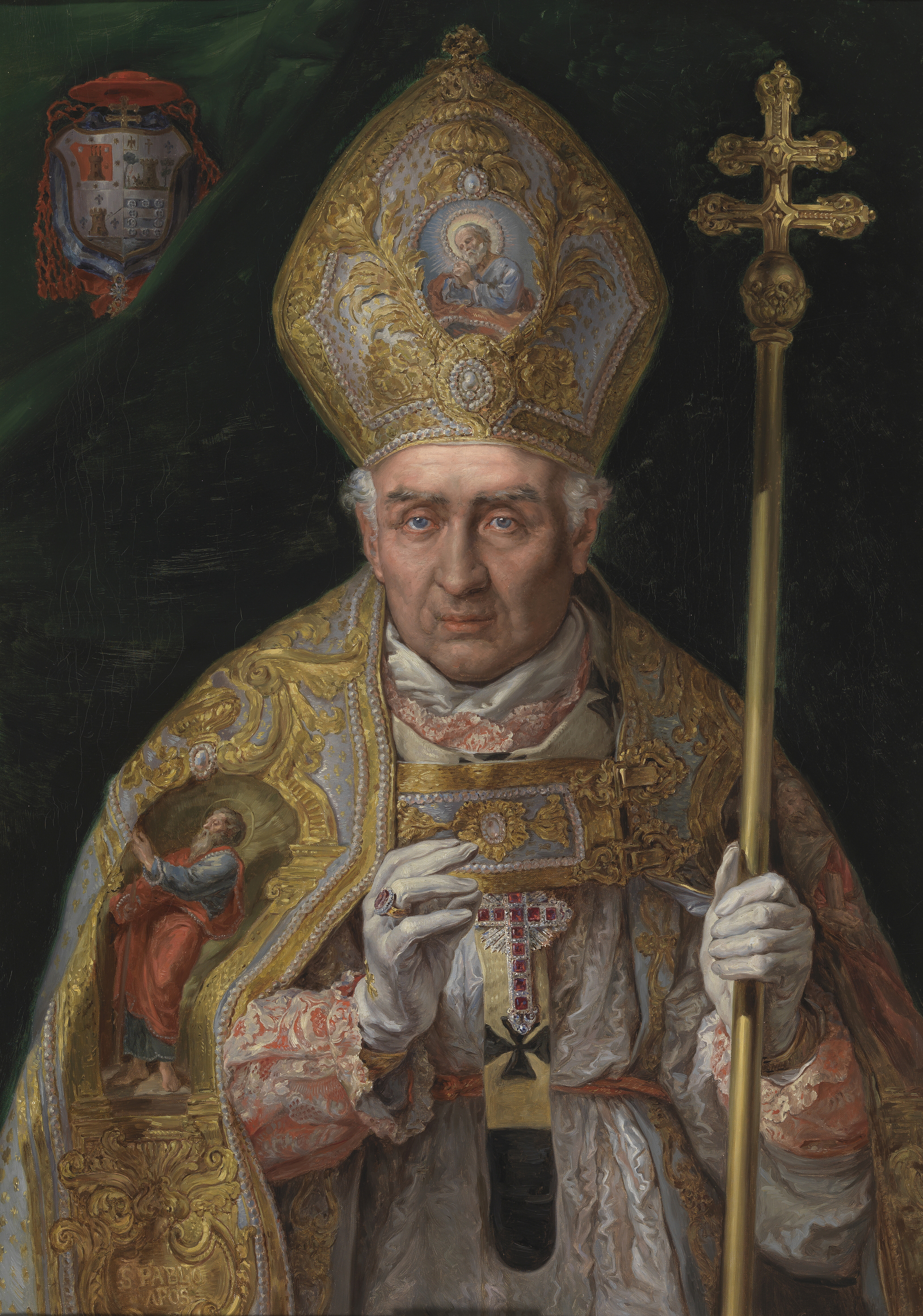 Retrato del eclesiástico español Pedro Inguanzo Rivero (1764-1836), que llegó a ser cardenal de la Iglesia Católica, obispo de Zamora y arzobispo de Toledo. Esta obra es una copia del retrato del arzobispo ejecutado por Vicente López Portaña y conservado en la Sala capitular de la catedral de Toledo.